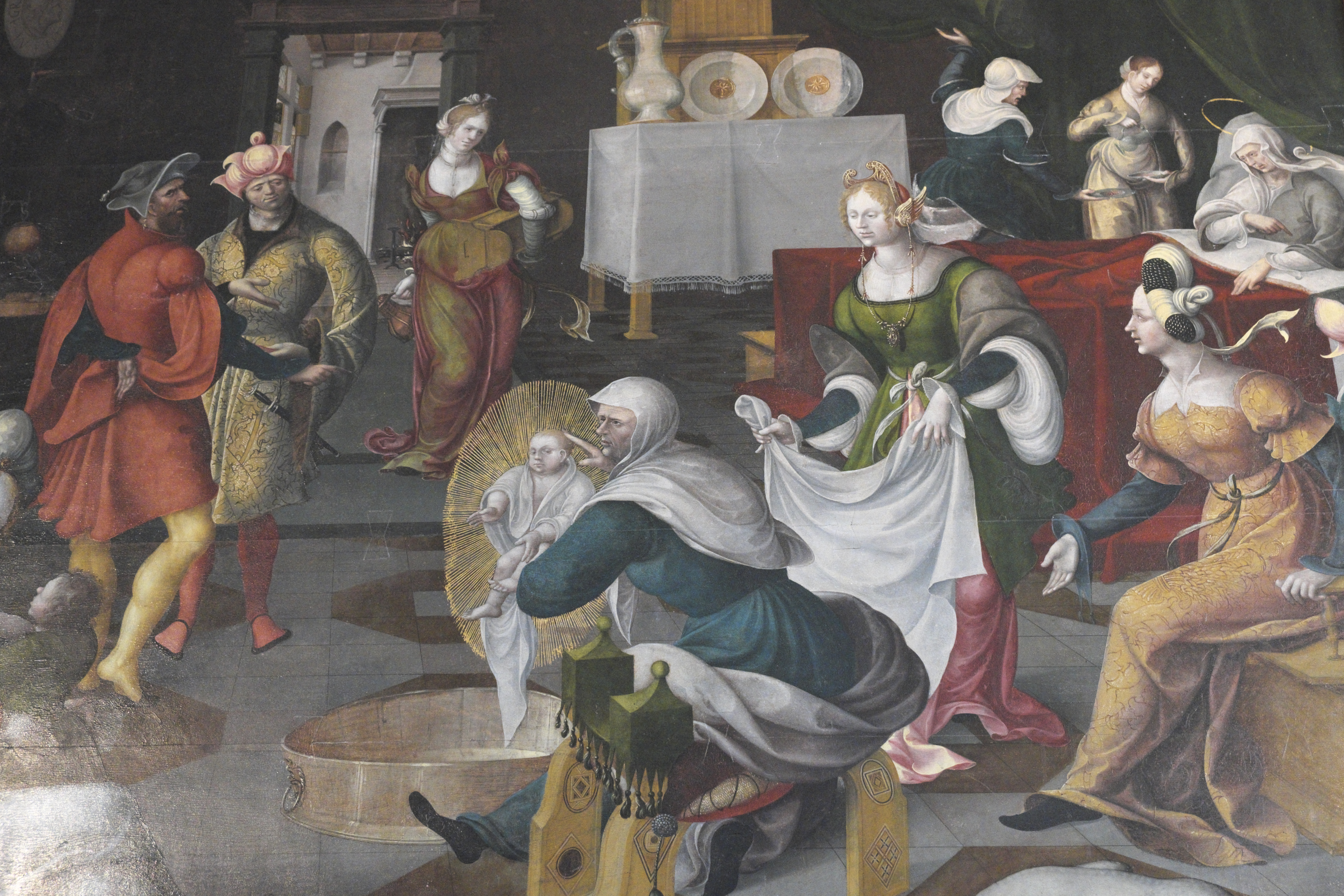 Katholische Kirche Saint-Martin in Auxey-Duresses im Département Côte-d’Or (Bourgogne-Franche-Comté/Frankreich), Marientriptychon, Mittelbild